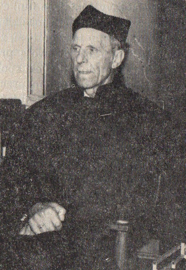 Zbigniew Zakrzewski w 1986r.